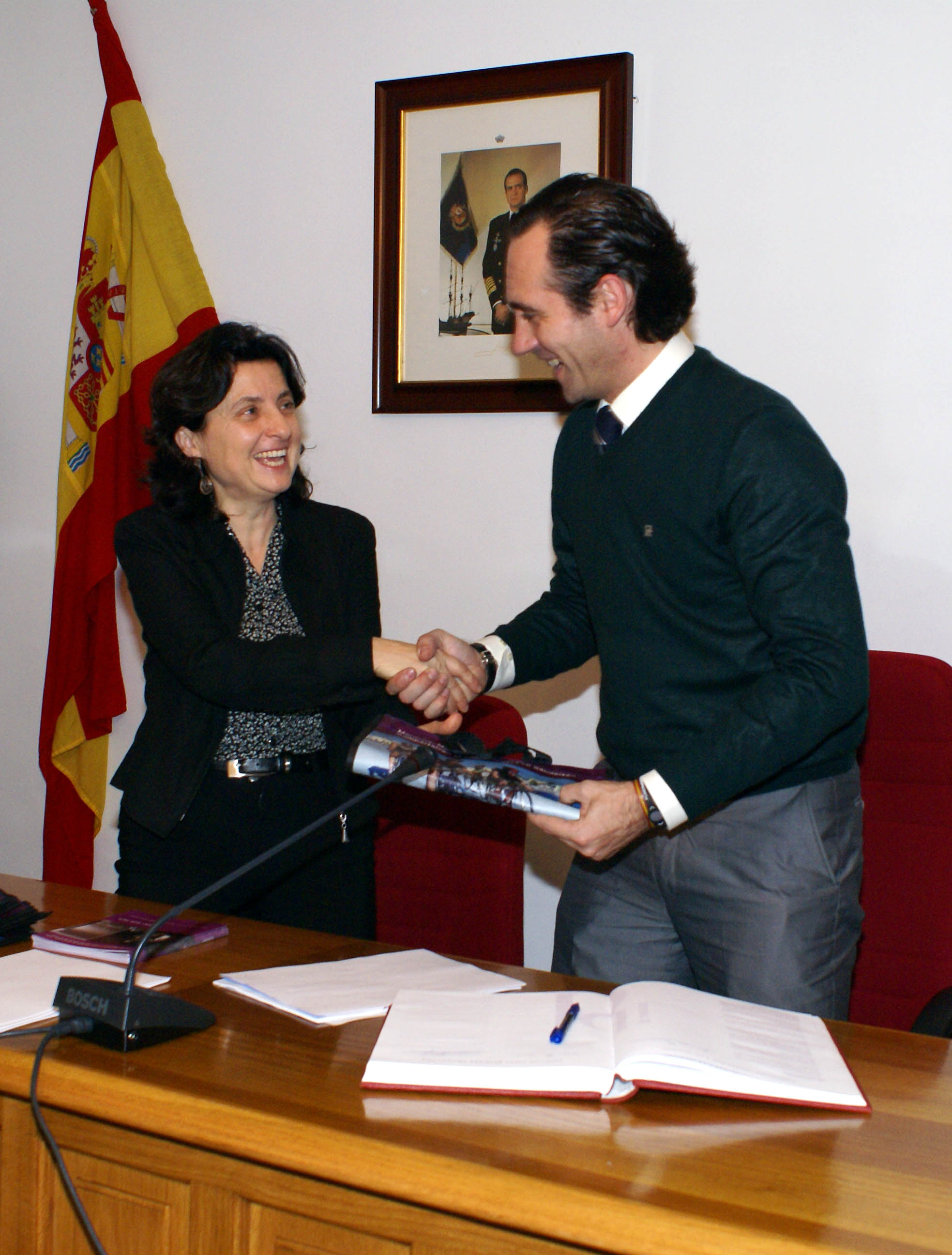 Josefina Santiago i José Ramon Bauzà